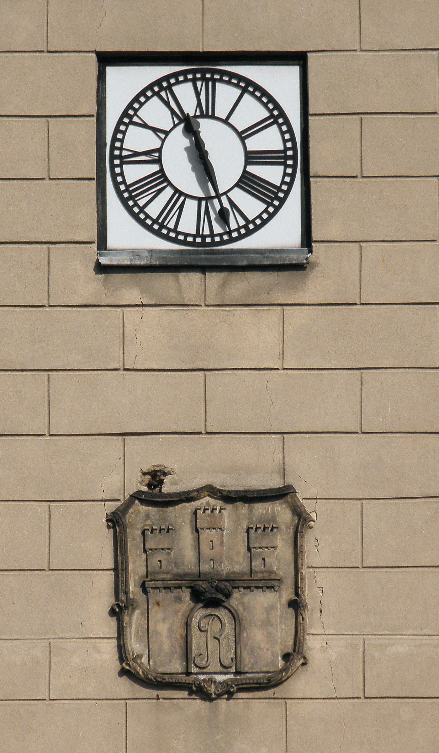 Ratusz w Radomiu - zegar i herb miasta na ratuszowej wieży.